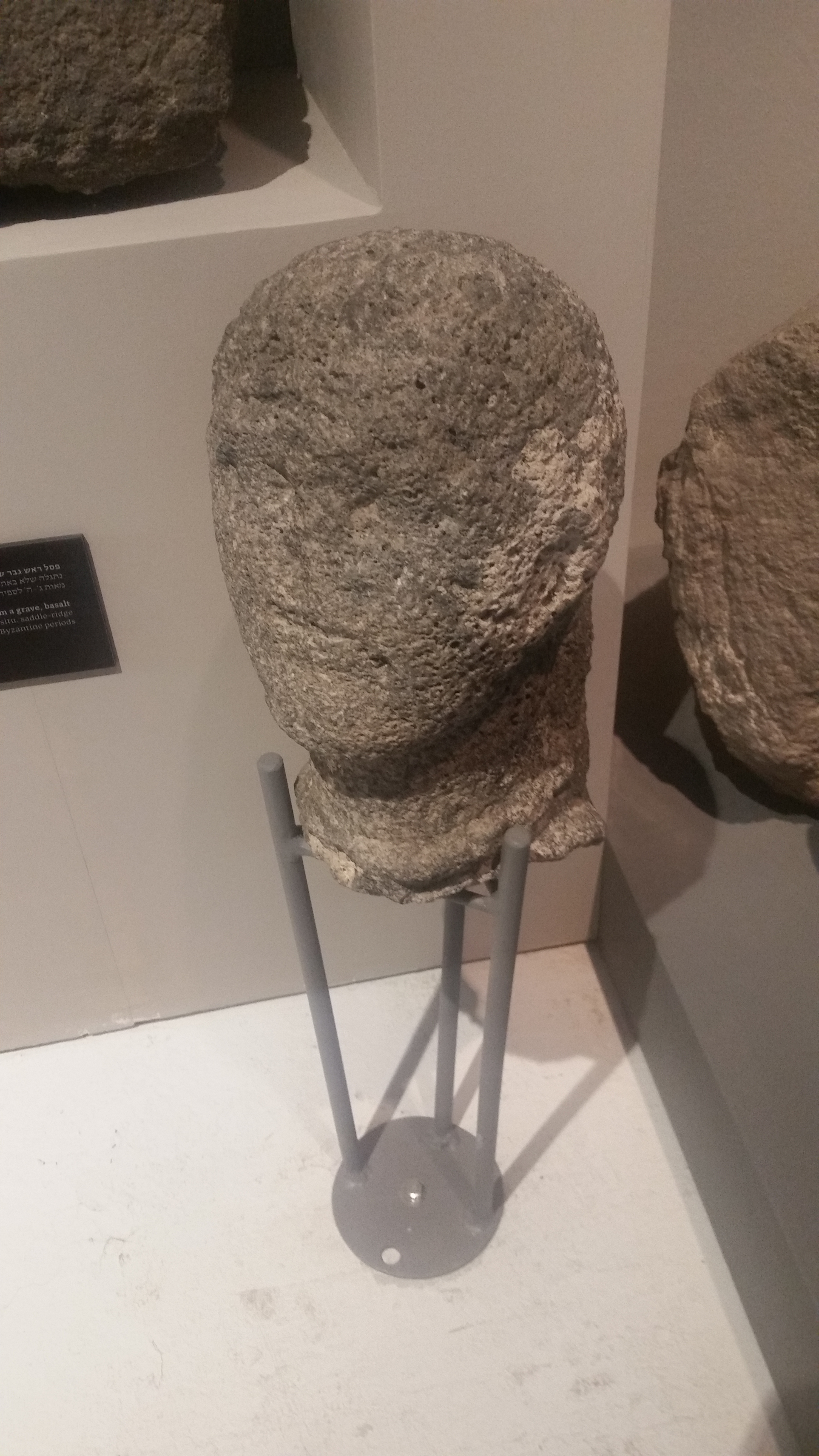 פסל ראש גבר עשוי בזלת שנמצא בחפירות הארכאולוגיות בסוסיתא בתוך קבר. מתוארך למאות ה-3 עד ה-5 לספירה. מוצג בתערוכה במוזיאון הכט על חפירות סוסיתא